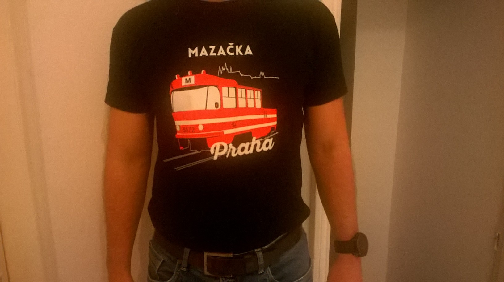 Triko s mazací tramvají M 5572